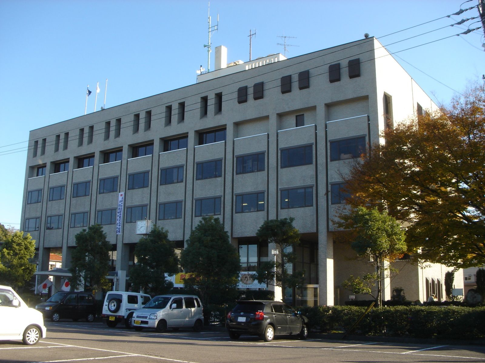 Tajimi City hall（多治見市市役所）,Tajimi,Gifu,Japan(岐阜県多治見市)で撮影。